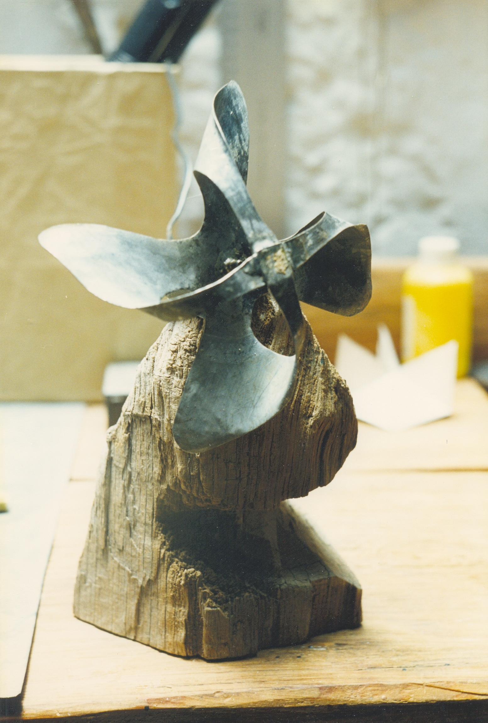 Whirligig 16